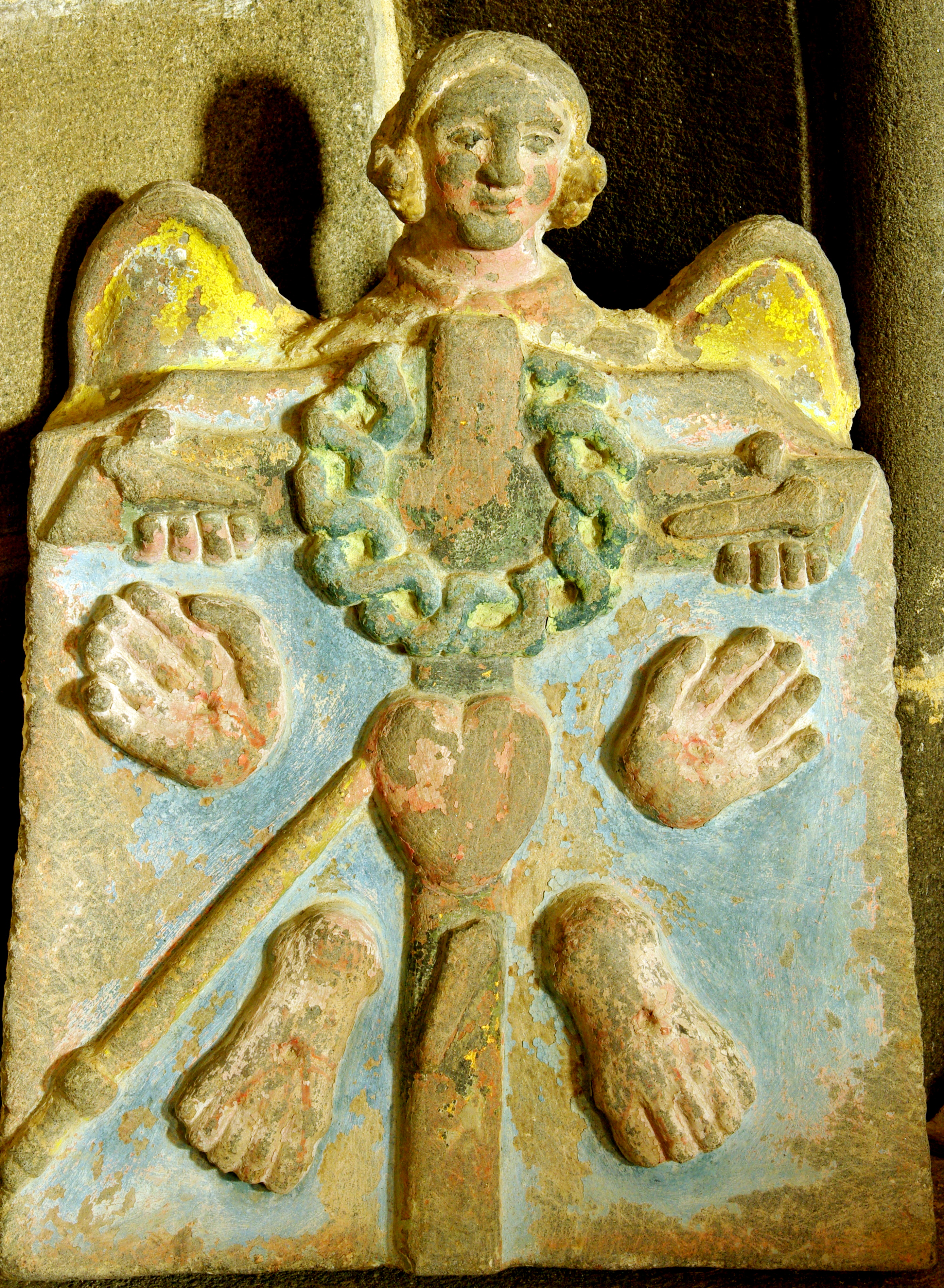 Eglise de Logonna-Daoulas, ange aux cinq plaies, kersanton polychrome.JPG